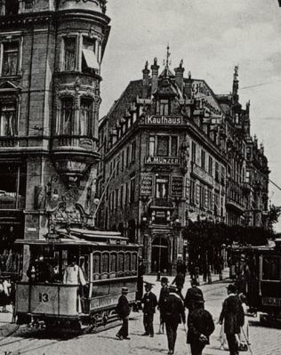 Kaufhaus Münzer, Kaiserstr. 27, Heilbronn. Ausschnitt aus einer Ansichtskarte im Heilbronner Stadtarchiv, Signatur F003-M_0200-530